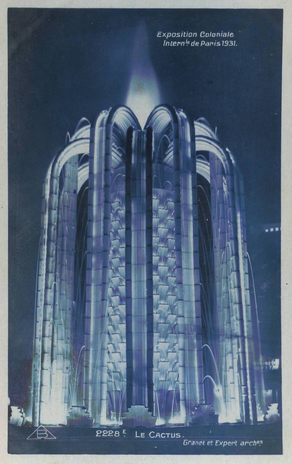 Le Cactus, fontaine monumentale lumineuse à l'Exposition Coloniale de Paris en 1931